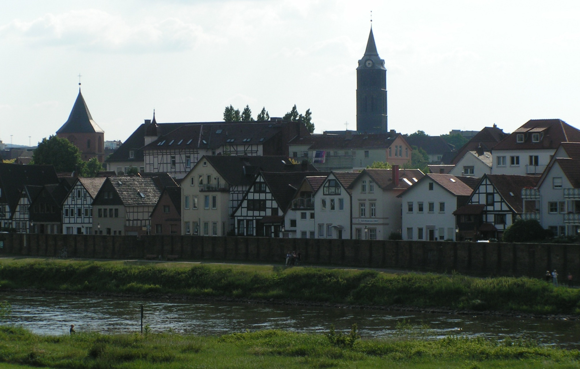 Minden: Blick aufs Fischerviertel aus dem Zug Kleinenbremen-Minden heraus